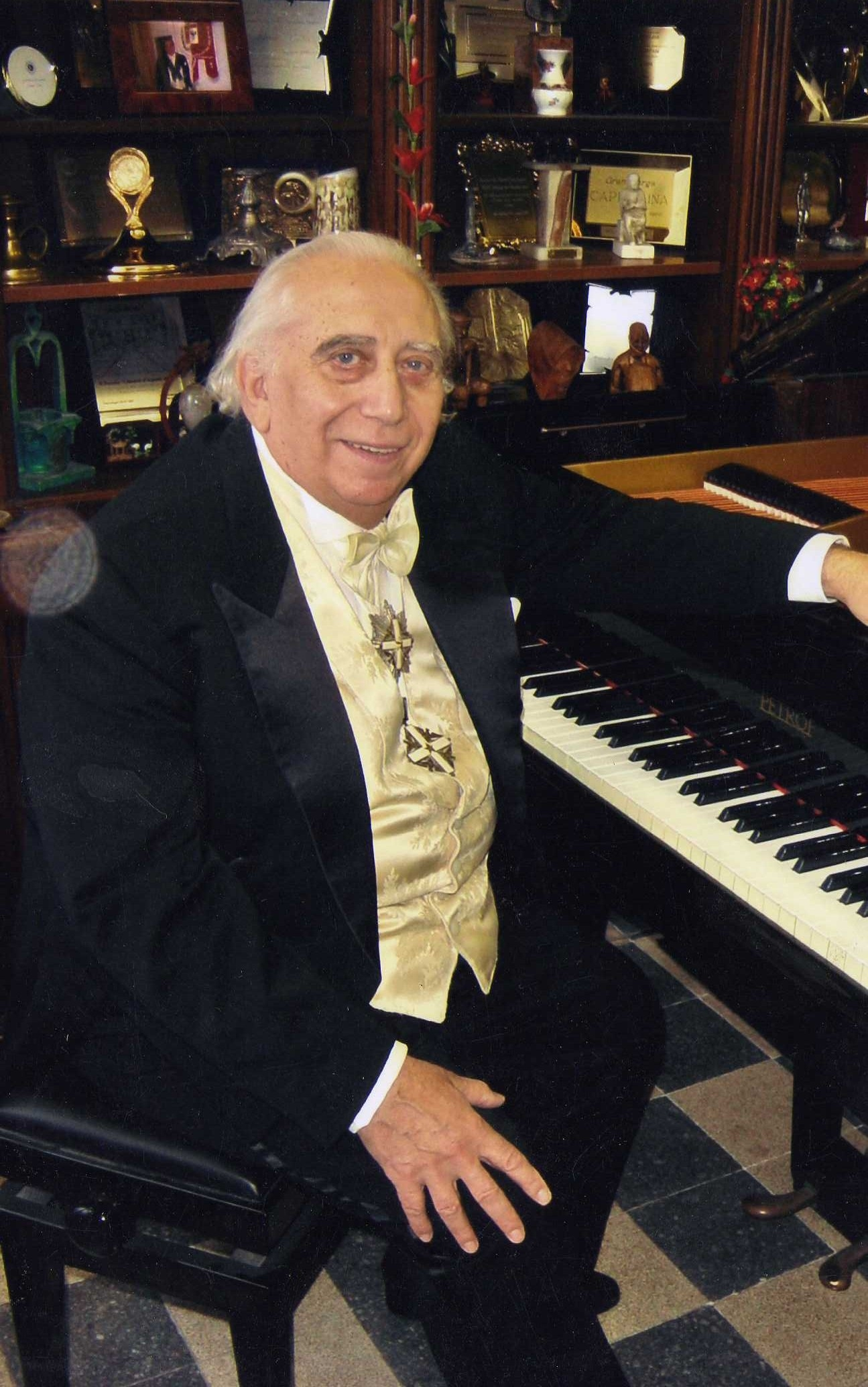 Musicista e compositore italo - argentino